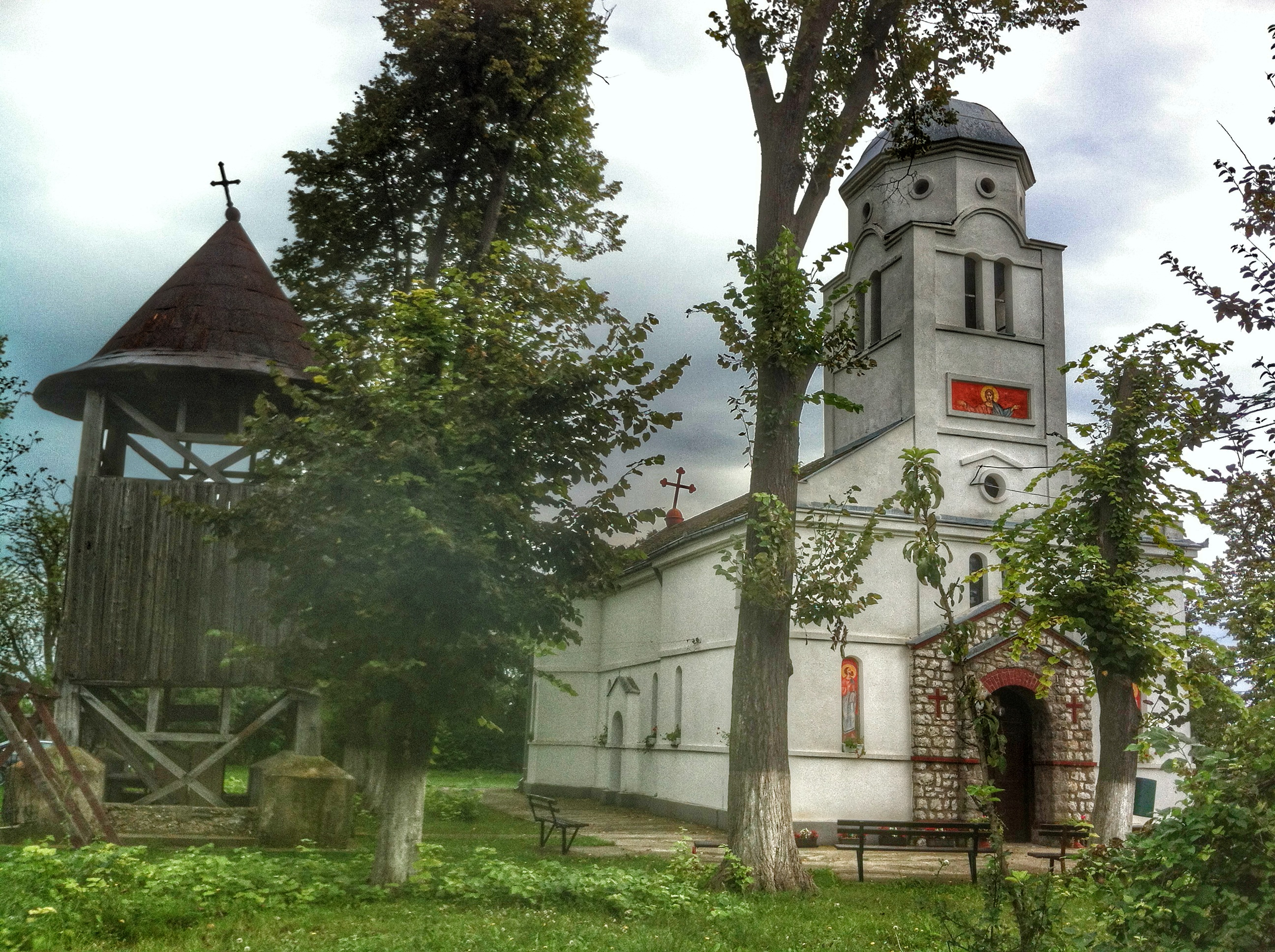 Српски (ћирилица): Саграђена је 1890.године. У порти се налази дрвени звоник, парохијски дом и мала капела са извором подигнута1929.године.